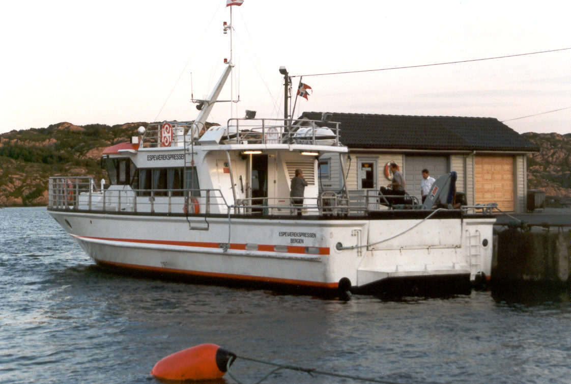 M/S Espeværekspressen.